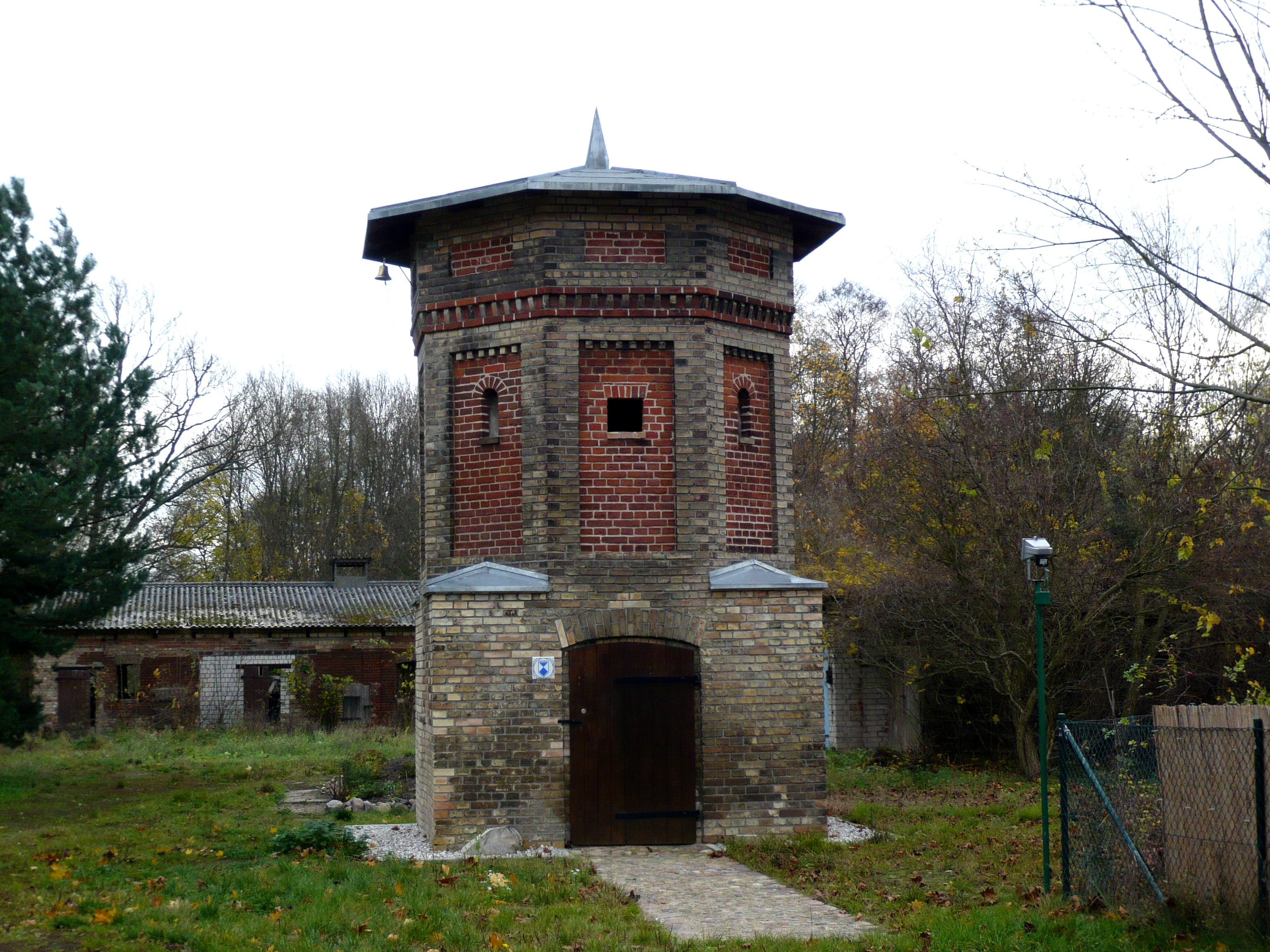 Baudenkmale: Taubenturm + eh. Kuhstall (hinten)